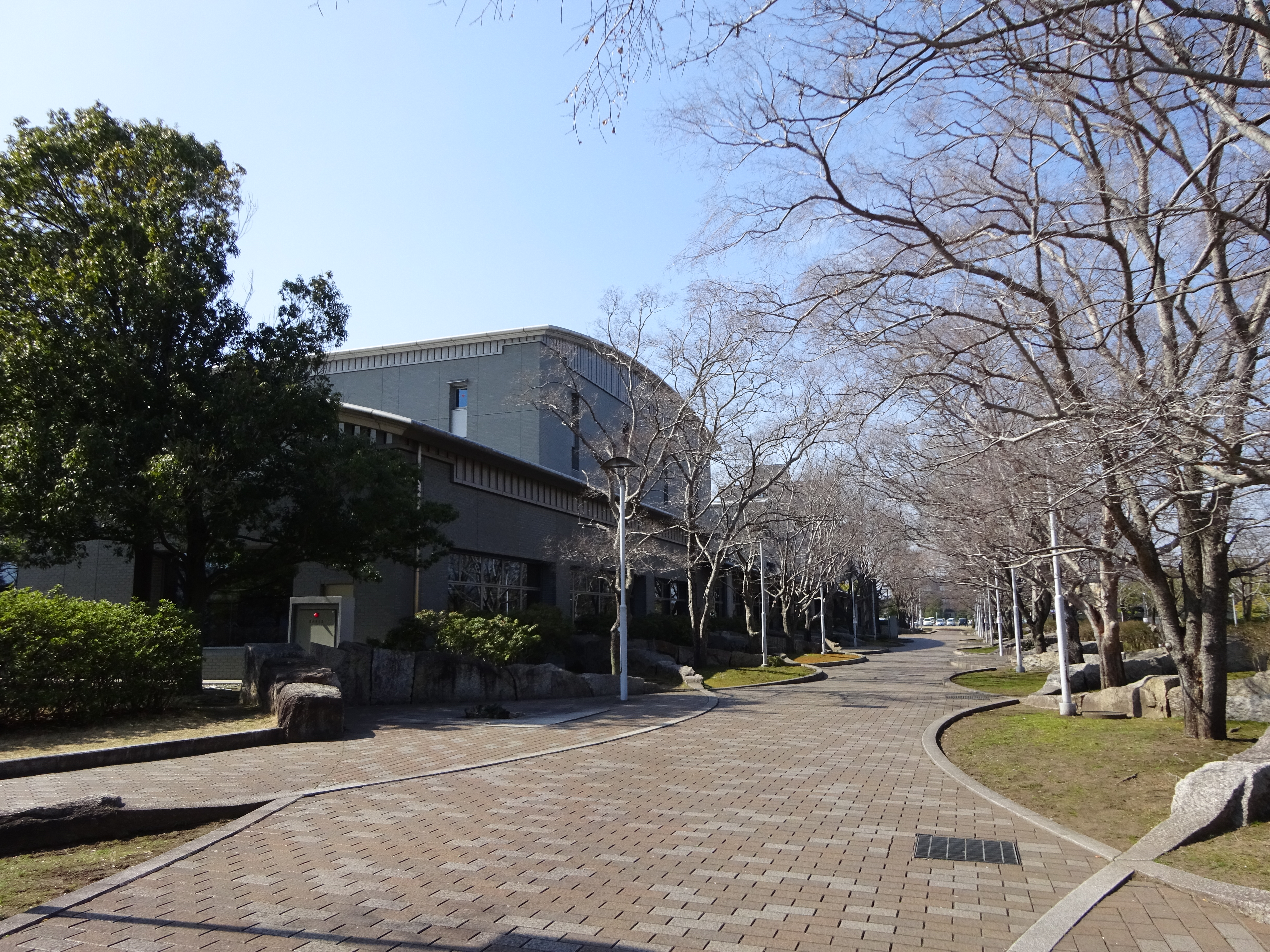 香川県立図書館の前庭（四月）